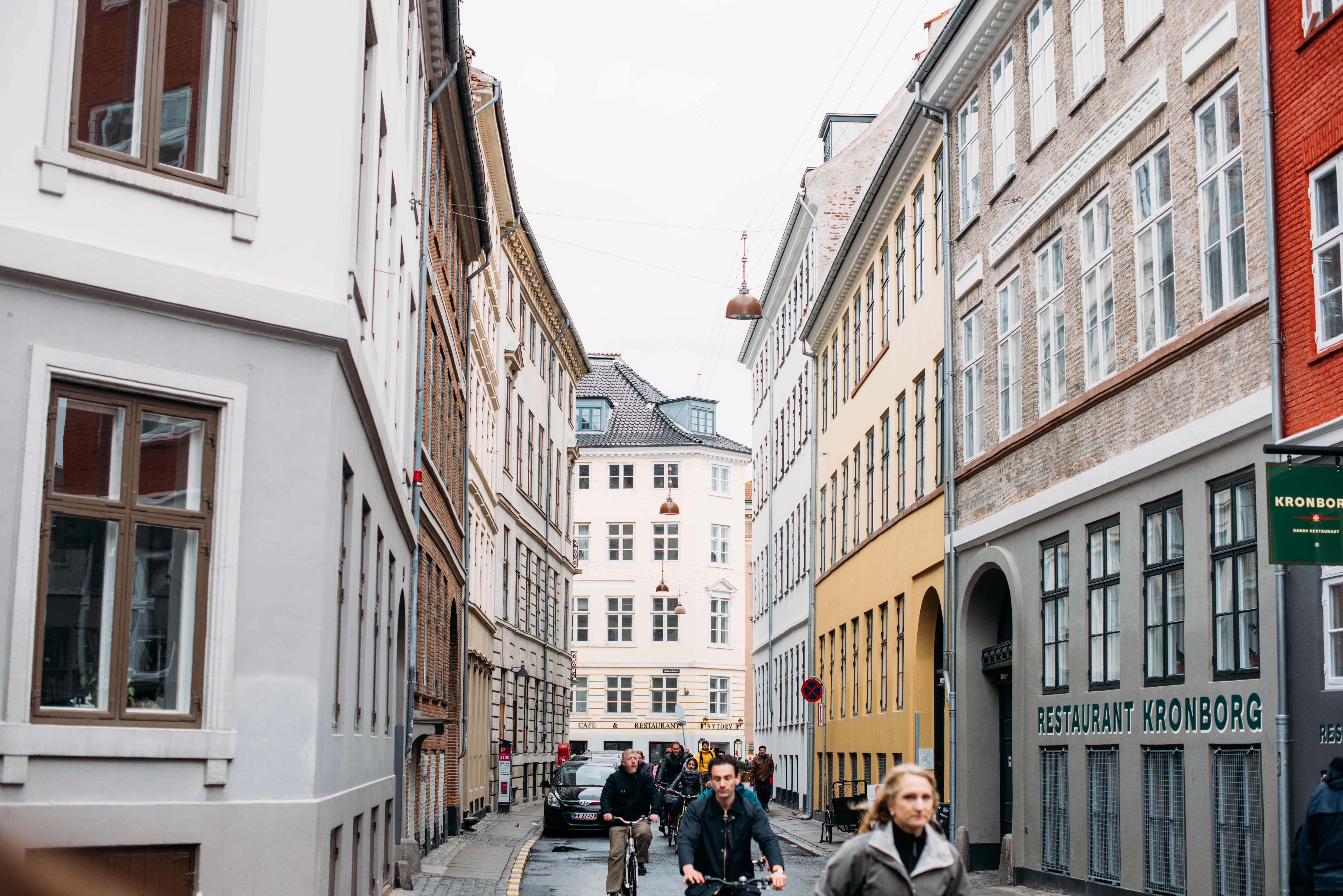 Brolæggerstræde in Copenhagen, Denmark